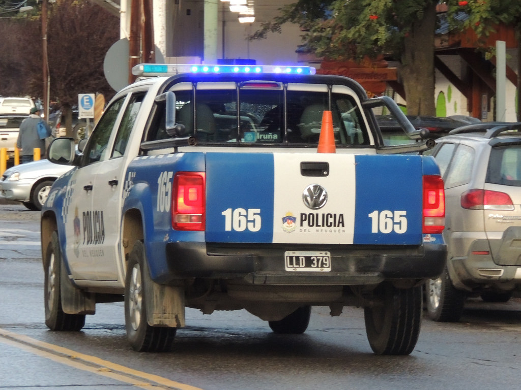 Camioneta Volkswagen Amarok de la Policía de Neuquén patrullando la localidad de San Martín de los Andes